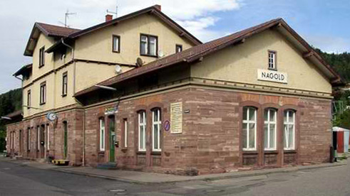 Nagold Bahnhof 2004 - selbst fotografiert von Benutzer:Enslin 13.09.2004